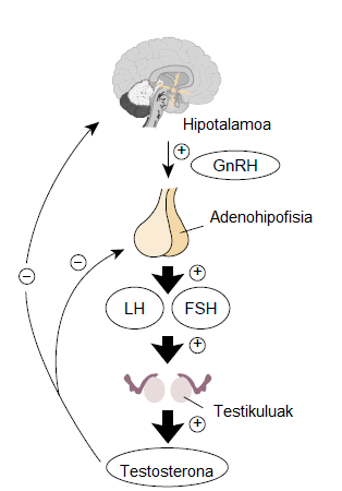 Gonadotropinen arretako mekanismoa